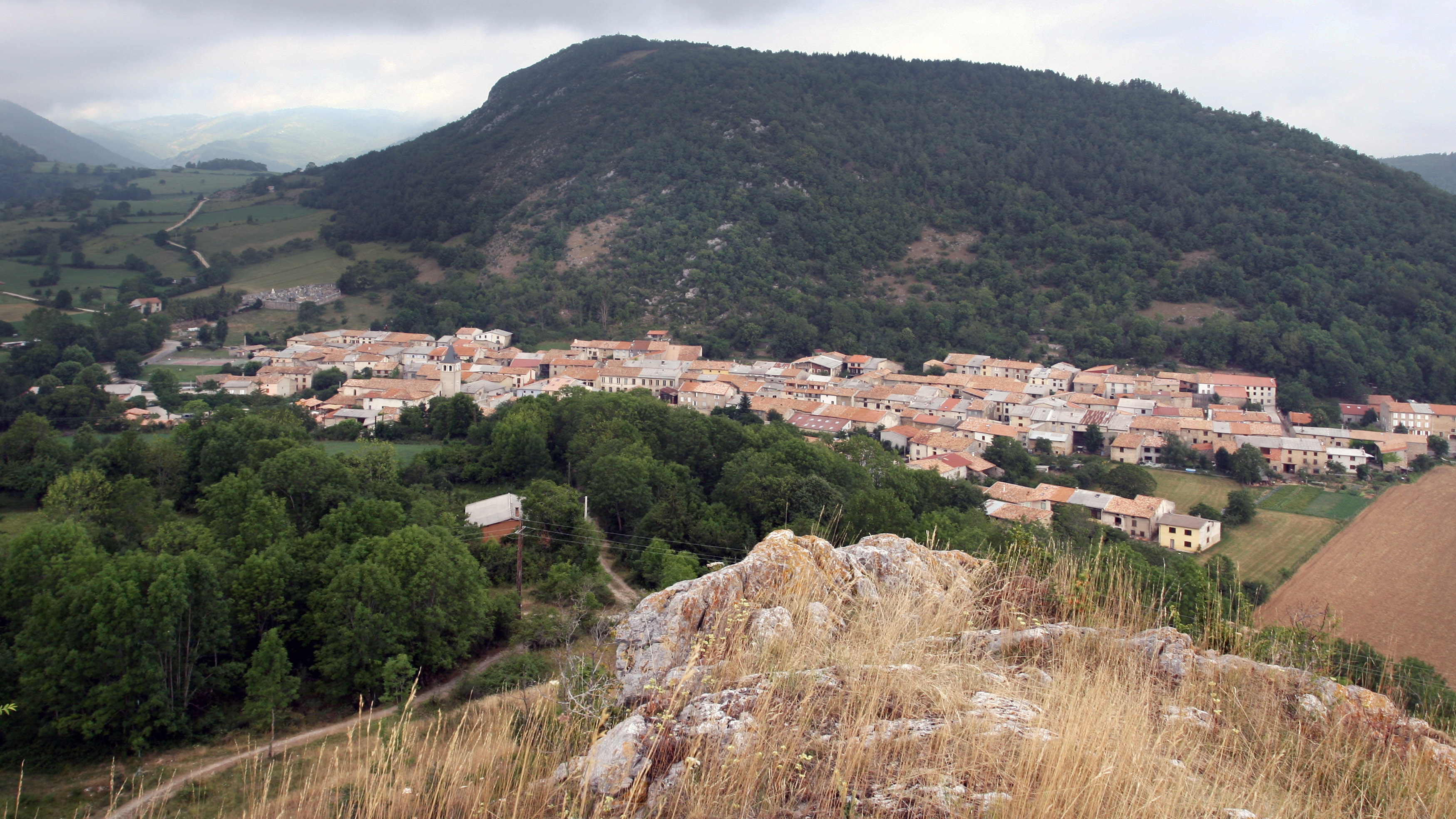 Vue du chateau